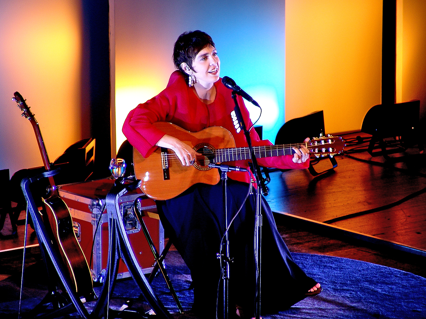 Adriana Calcanhoto